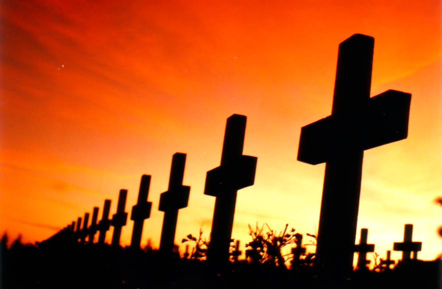 coucher de soleil sur l'ossuaire